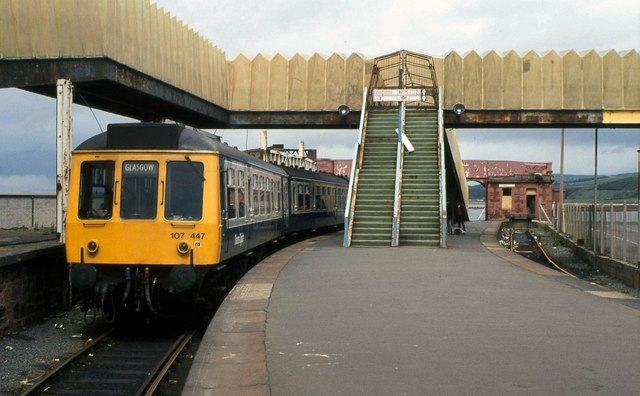 Ardrossan Harbour station (2)